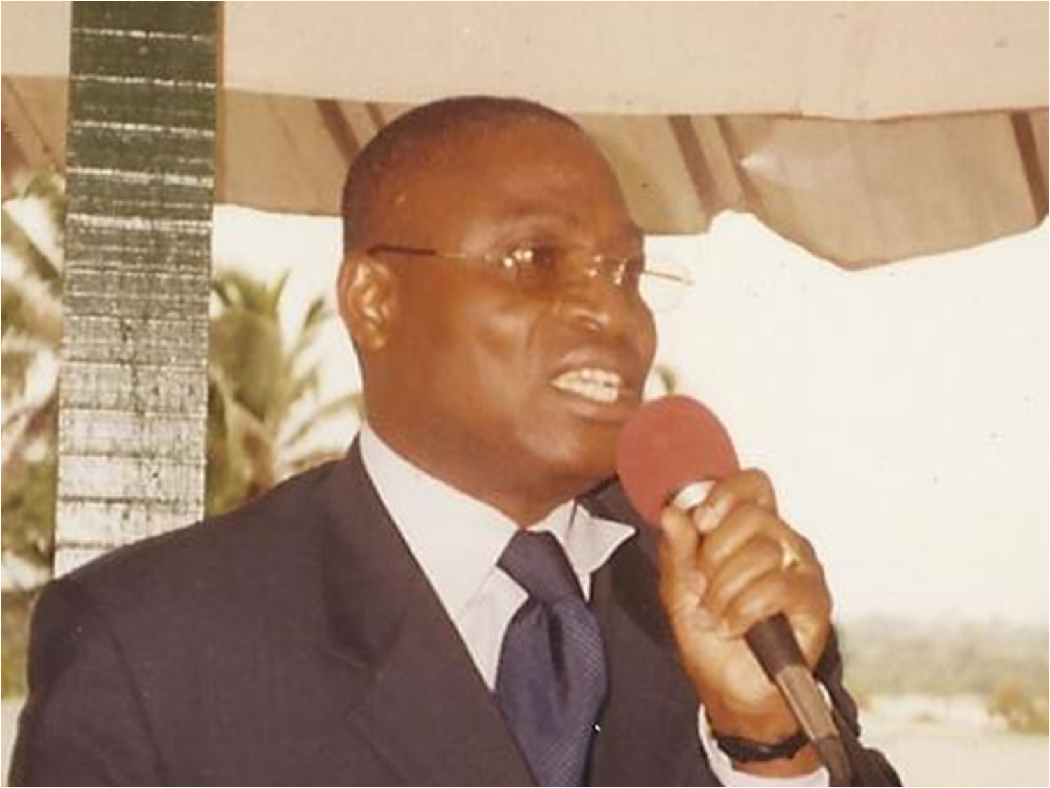 Dagobert Banzio, responsable politique du PDCI